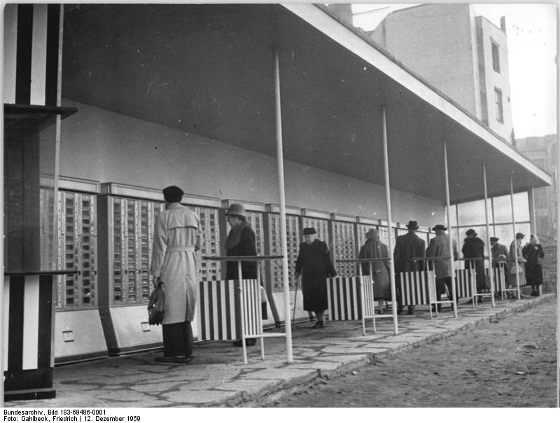 Chemnitz, "Automatenstraße" Zentralbild Gahlbeck 12.12.1959 Moderne Automatenstrasse in Karl-Marx-Stadt eröffnet Eine moderne, überdachte Automatenstrasse wurde im Zentrum von Karl-Marx-Stadt eröffnet. Die 16 Automaten bieten ein reichhaltiges Warensortiment. Von der Seife mit Seiflappen und kleinem chinesischen Handtuch über Gummiband, Patentnadel und Schnürsenkeln bis zur Wurst mit Brötchen sind hier viele Artikel des täglichen Bedarfs zu haben. Die im Haushalt nach Ladenschluß oftmals noch benötigten Sicherungen und Glühbirnen können hier ebenfalls eingekauft werden. Mit dieser modernen Einrichtung verwirklichten die Handelsorgane eine der Forderungen der Leipziger Handelskonferenz.